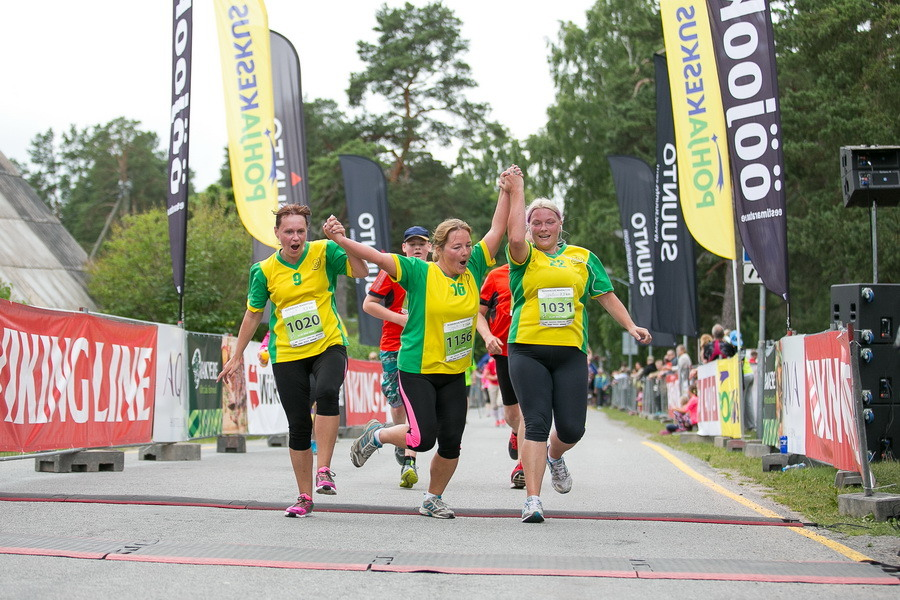 Südasuvi 1